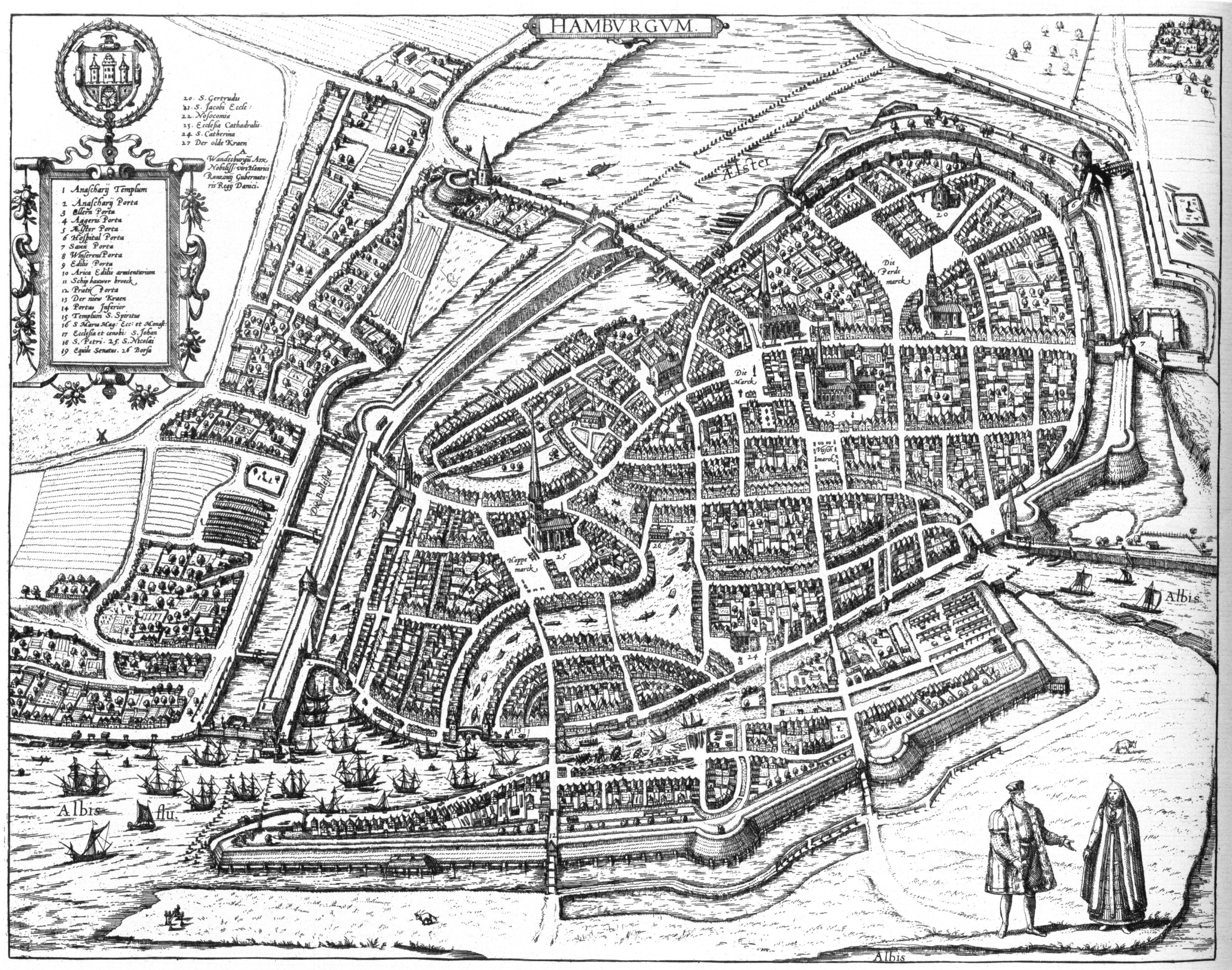 Neuauflage der 1588 im vierten Band des Städtebuchs "Civitates Orbis Terrarum" von Georg Braun und Franz Hogenberg erschienenen Vogelschaukarte.